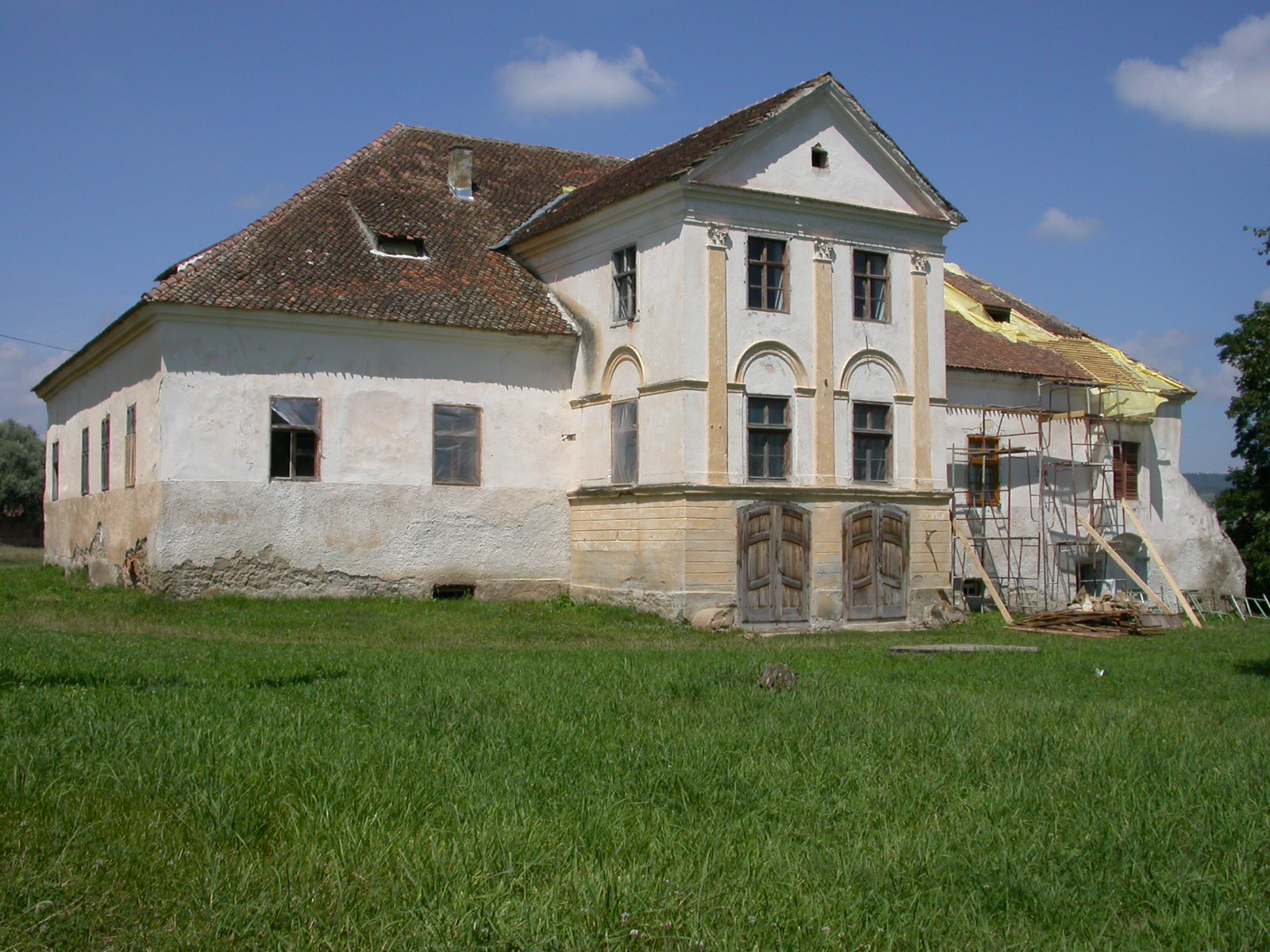 Ansamblul castelului Apor, sec. XVI - XIX